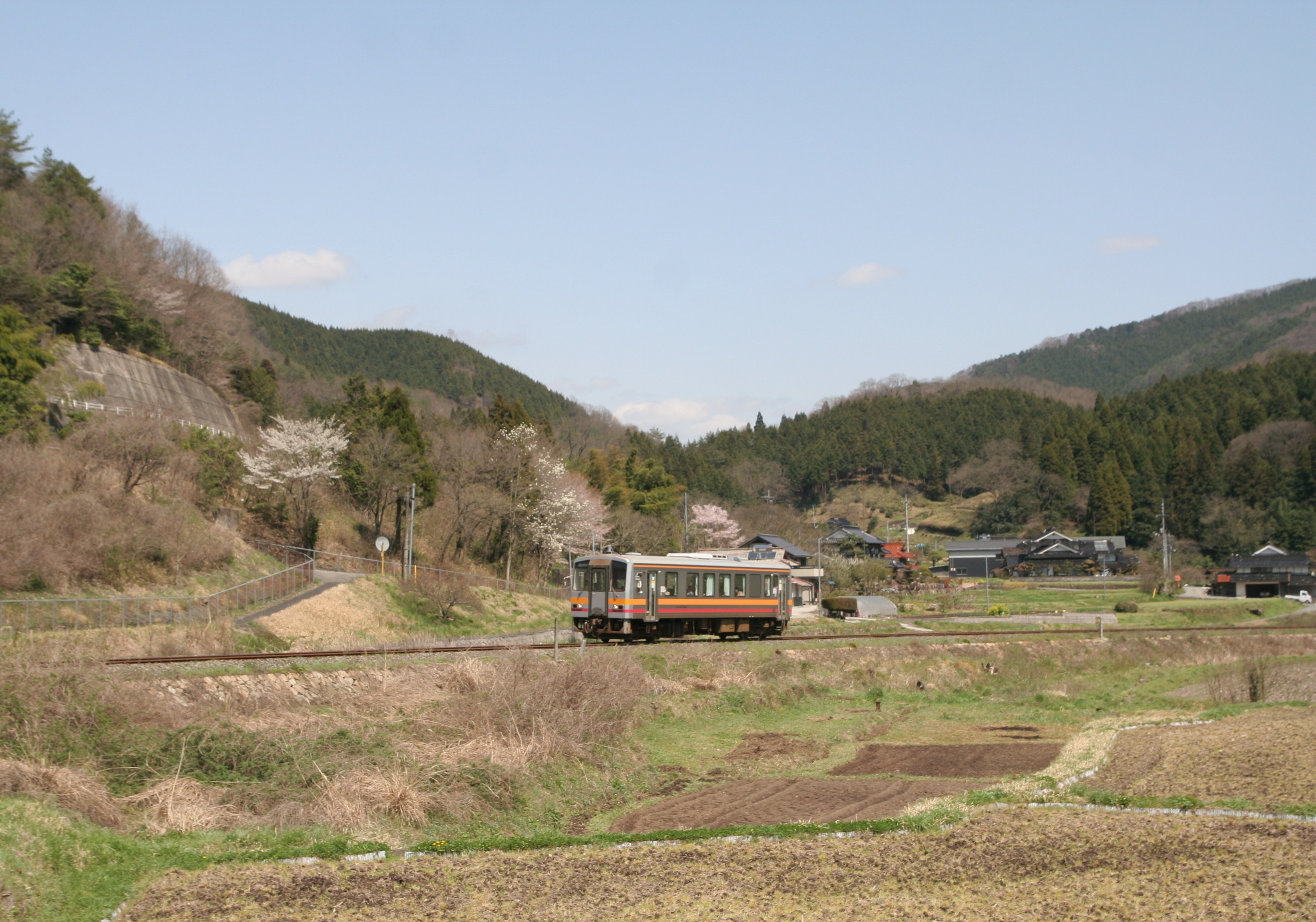 芸備線、坂根 - 市岡間を走行するJR西日本キハ120形気動車